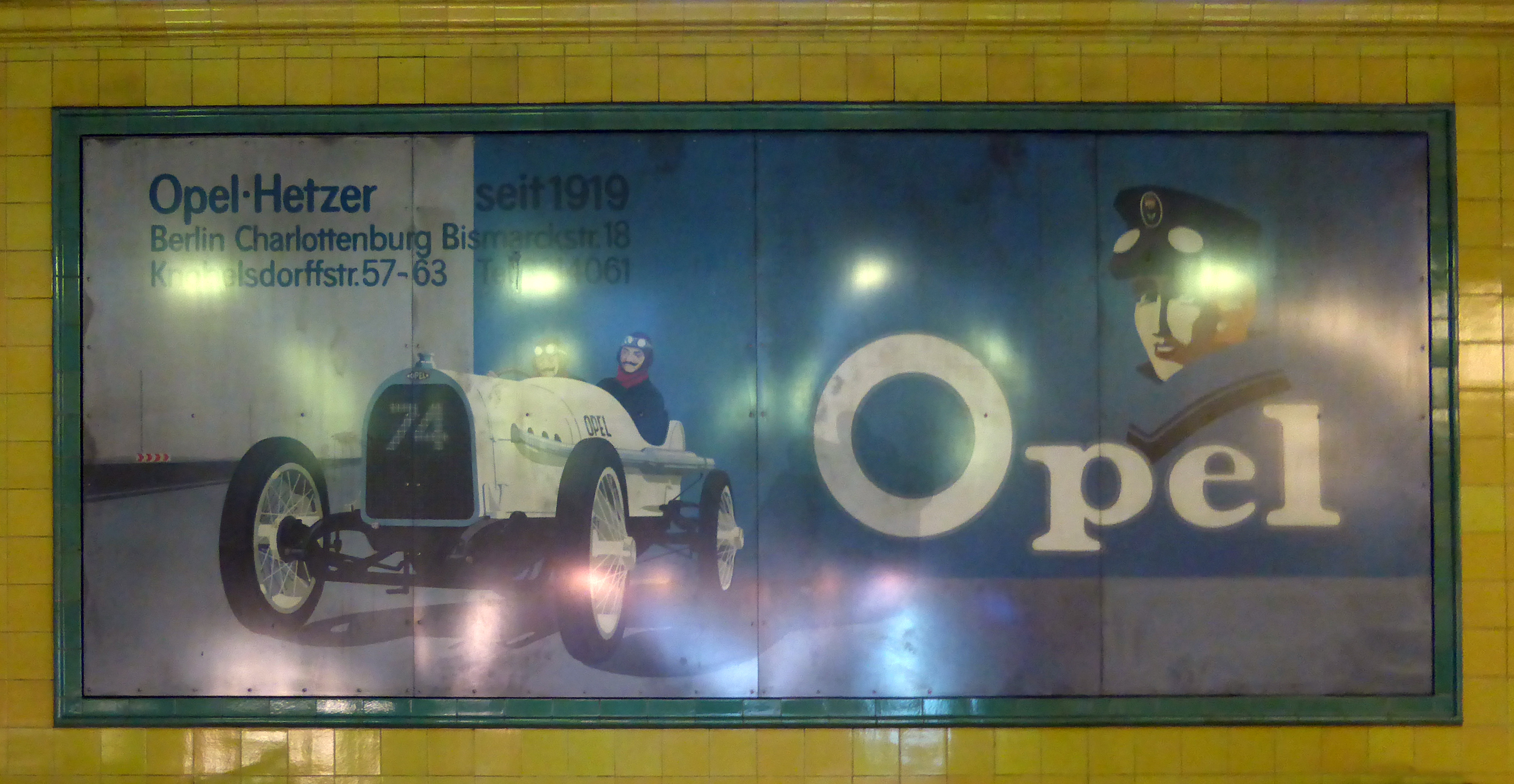 Werbefläche (Opel-Hetzer-Autohandel) im U-Bahnhof Wittenbergplatz, Berlin.